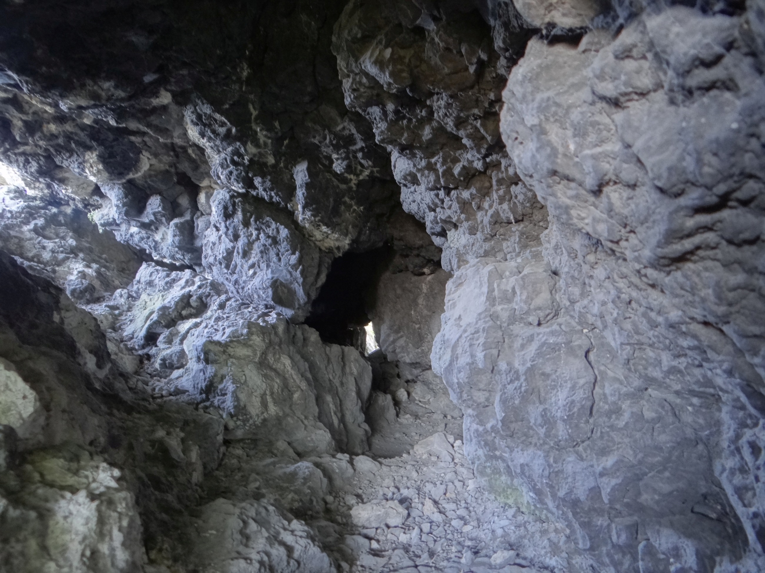 Schronisko na Półce w Igle